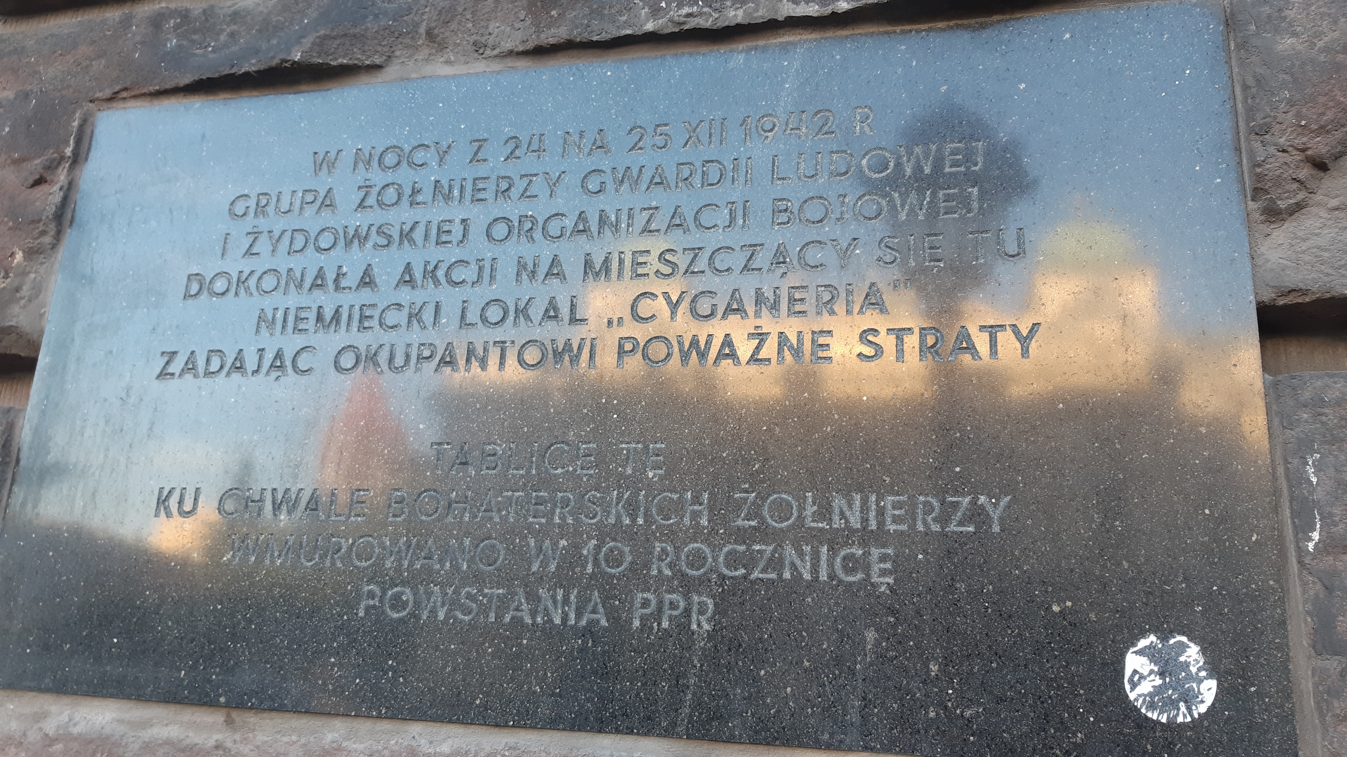 אתר "קפה ציגנריה" בקרקוב בו נערכה בדצמבר 1942 מתקפה על חיילים גרמנים - נמצא ברחוב שפיטלנה 38